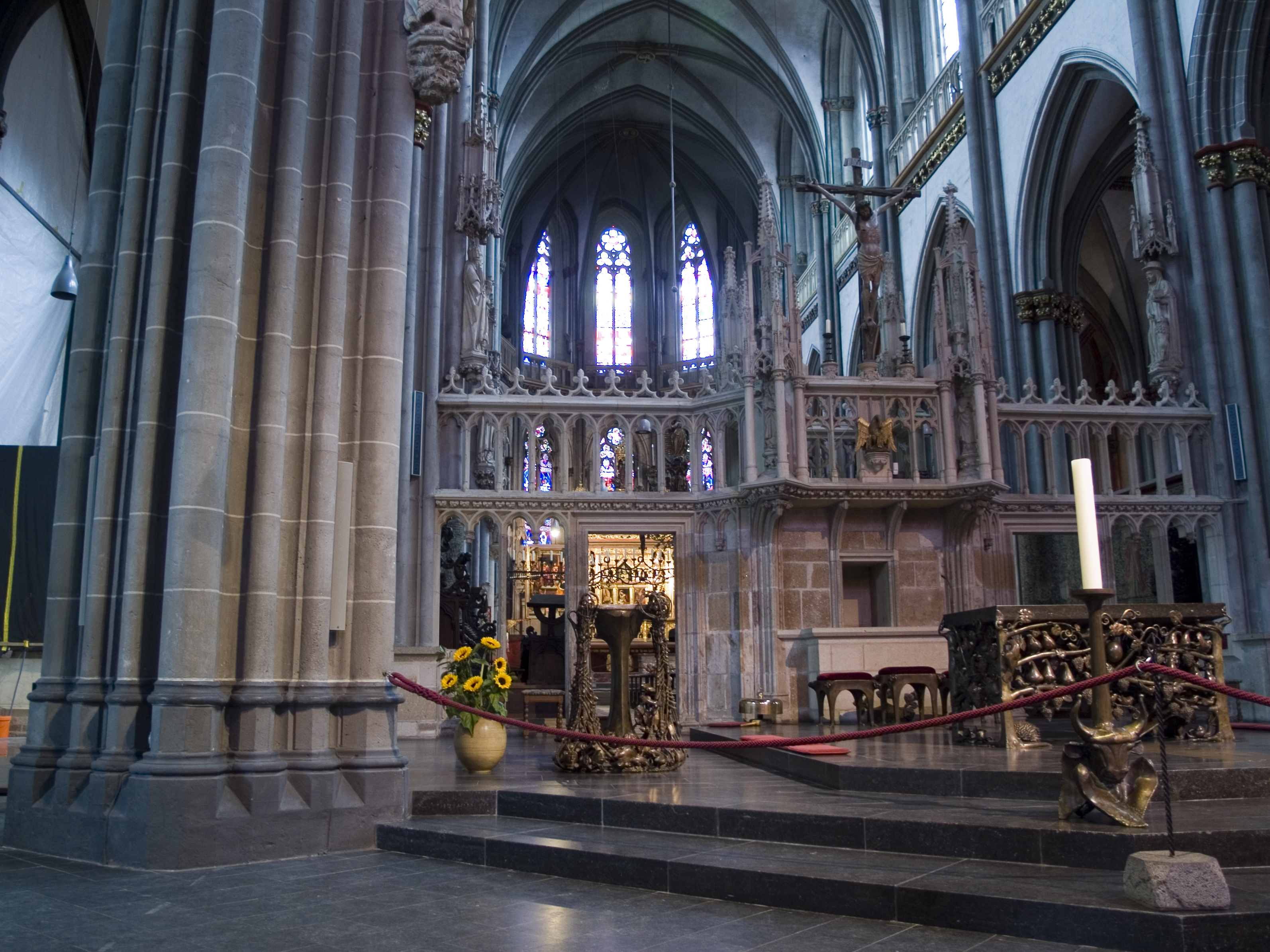 Северный Рейн - Вестфалия, Ксантен - собор Святого Виктора